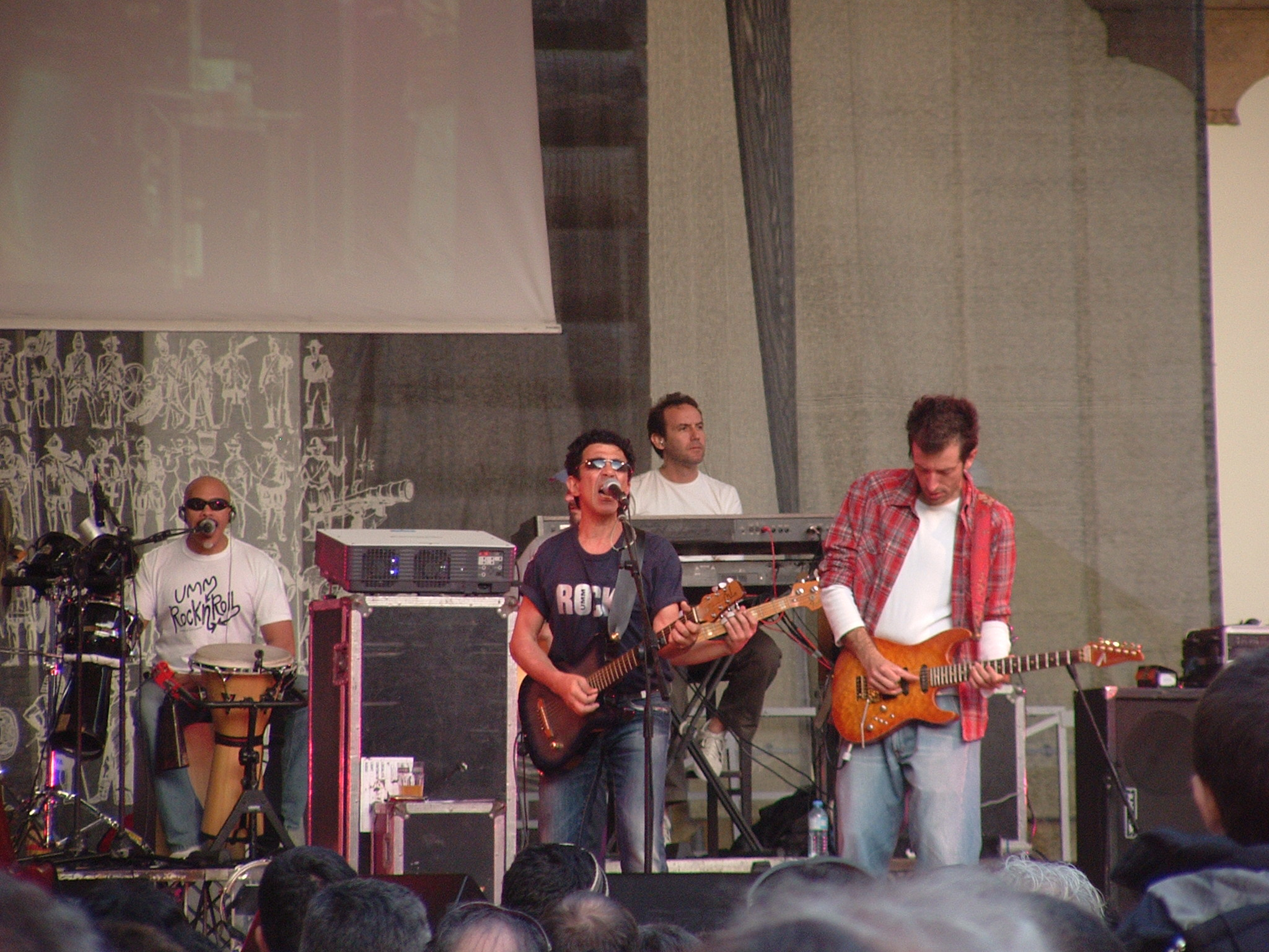 Edo in concerto a Lucca con la band - 25.04.2008 Patrix Duenas alle percussioni, Raffaele Lopez tastiere, Giuseppe Scarpato Chitarra